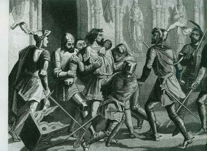 Gravat que recrea la detenció de Berenguer d'Entença pels seus homes